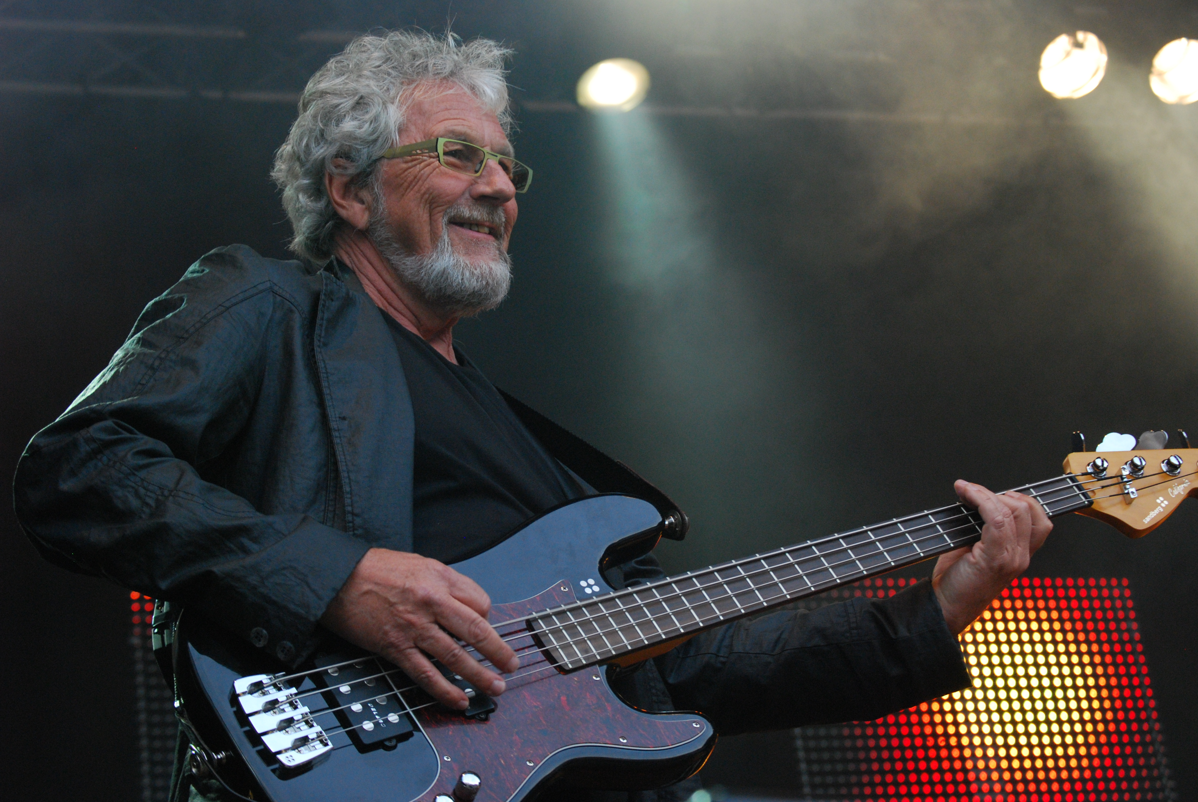 Arne Henry Sandum fra Hellbillies under en konsert i Langesund juli 2011.